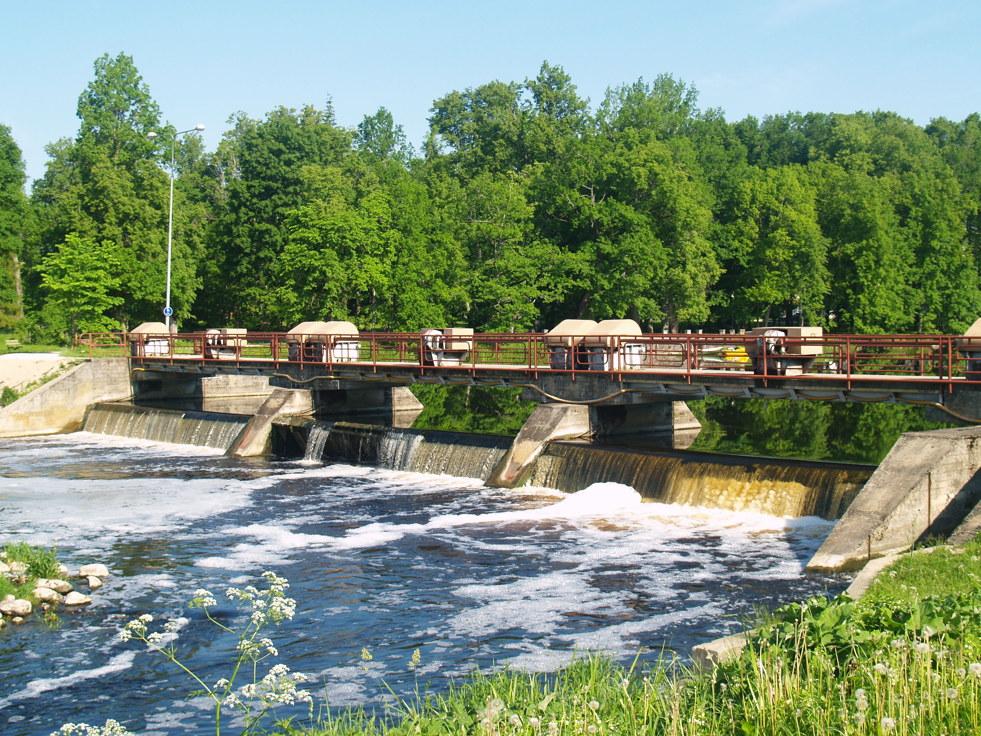 Jõgevamaa fotod